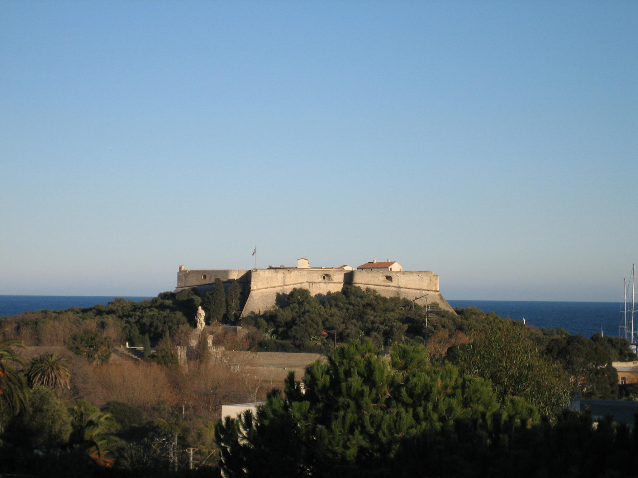 Fort carré, Antibes (France)